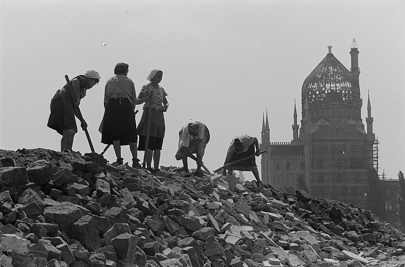 Original image description from the Deutsche Fotothek Frauen arbeiten auf einer Trümmerschutthalde. Blick gegen Zigarettenfabrik Yenidze